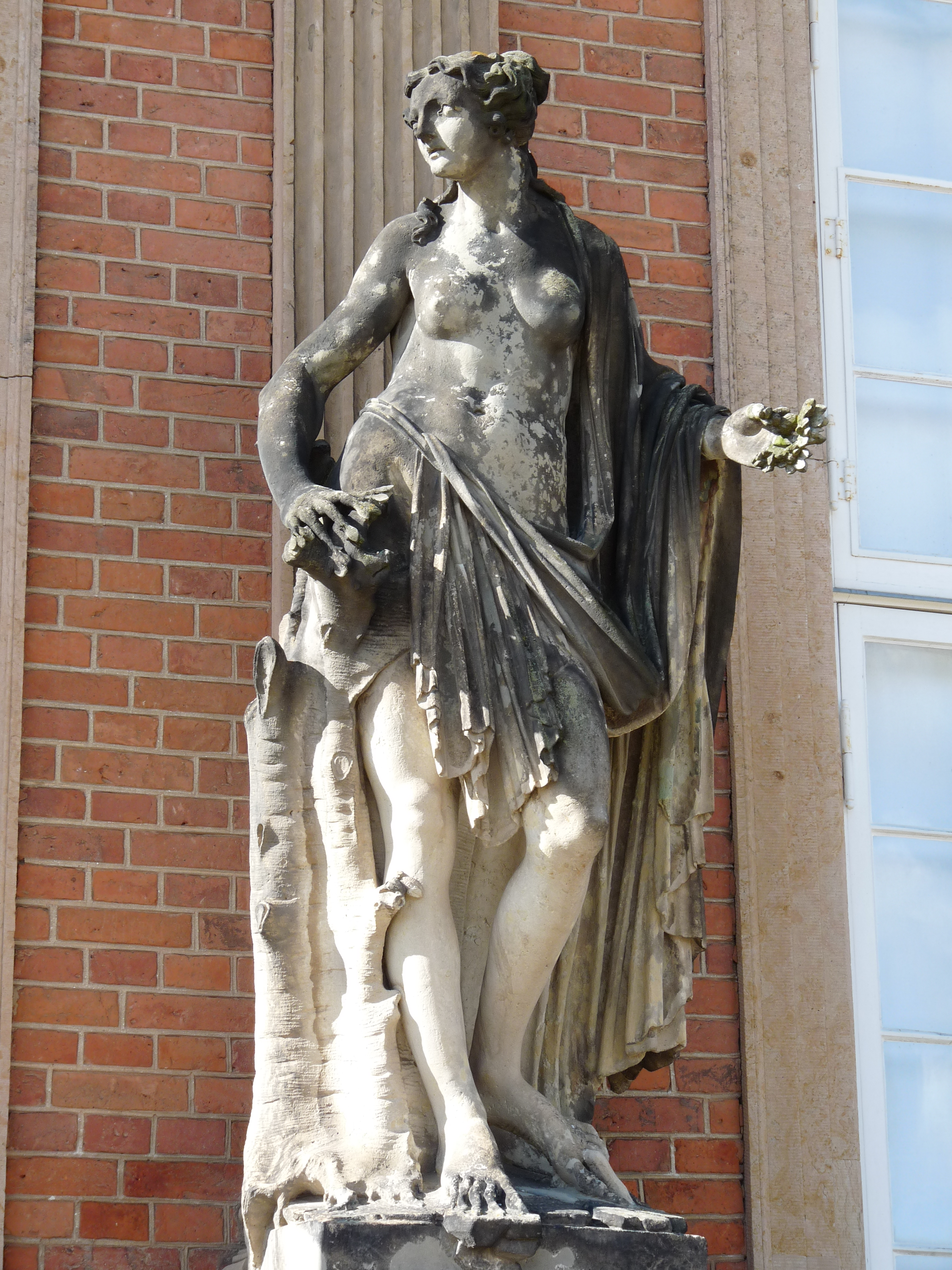 Daphne Hände & Füße in Verwandlung Friedrichsflügel Neues Palais Sanssouci